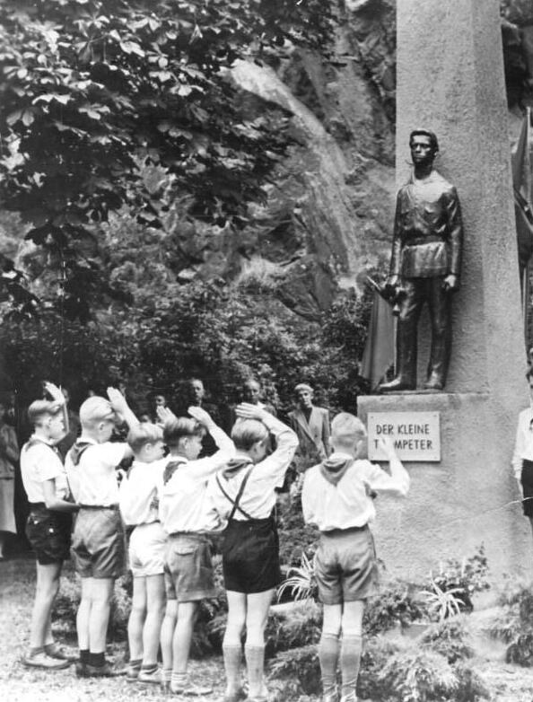 Halle, Rive-Ufer, Fritz-Weineck-Denkmal Zentralbild Krueger 14.8.1958 Telebild Zum III. Pioniertreffen in Halle Zum Gedenken an den von der Reaktion erschossenen Fritz Weineck, des "kleinen Trompeters" wurde am 14.8.1958 aus Anlass des III. Pioniertreffens am bisherigen Rive-Ufer in Halle, das gleichzeitig in "Fritz-Weineck-Ufer" umbenannt wurde, eine Statue aufgestellt. UBz: Hier grüßen Thälmann-Pioniere das eben enthüllte Denkmal.